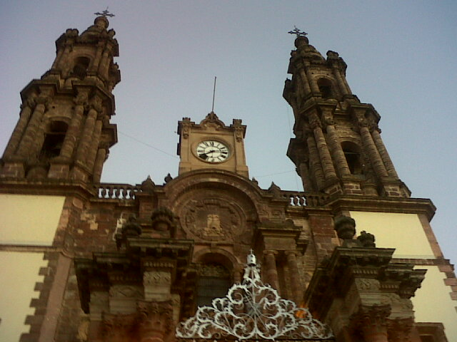 la Concatedral de Zamora